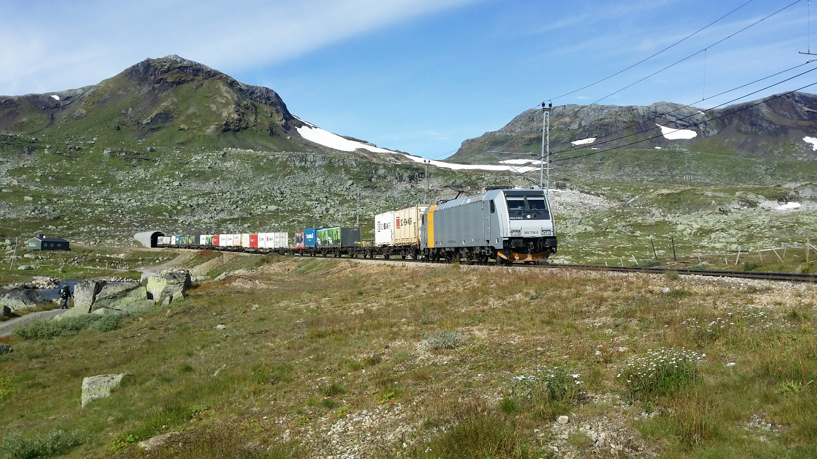 Traxx-lokomotiv med godstog på Finse.